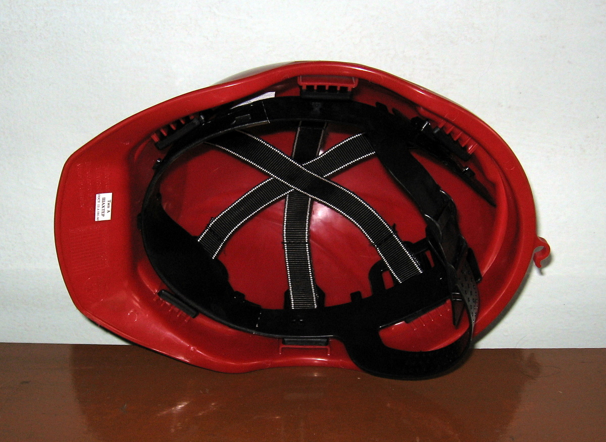 Шахтарська каска